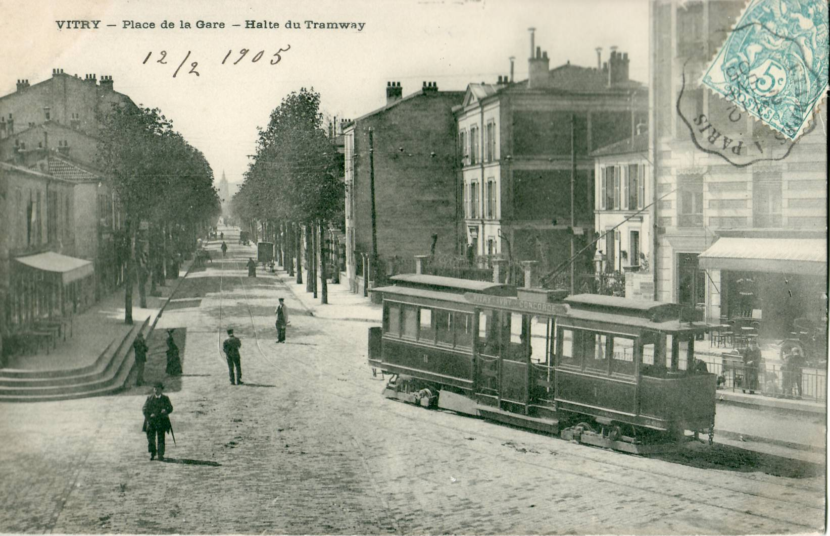 Carte postale ancienne, sans indication d'éditeurVitry-sur-Seine : Place de la gare - Halte du tramwayLigne Vitry - Ivry - Place de la ConcordeOblitération par timbre à date d'ambulant postal, ligne Étampes à Paris